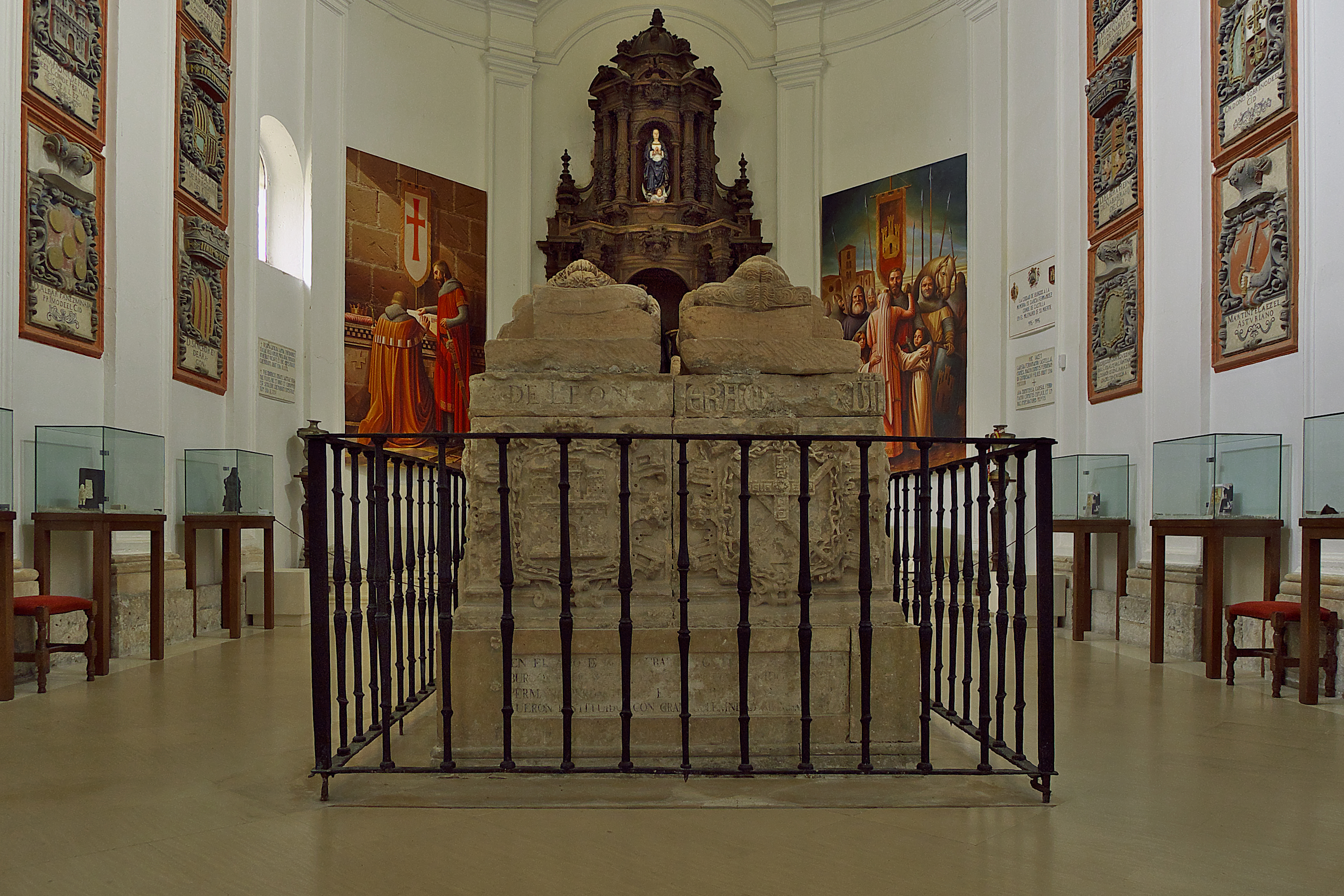 San Sisebuto, abad del Monasterio de San Pedro de Cardeña (1056-1081), acogió en su abadía, a Doña Jimena e hijas durante el destierro del Cid.